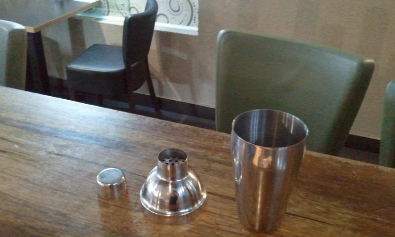 מסננת מובנת של שייקר, שייקר ופקק